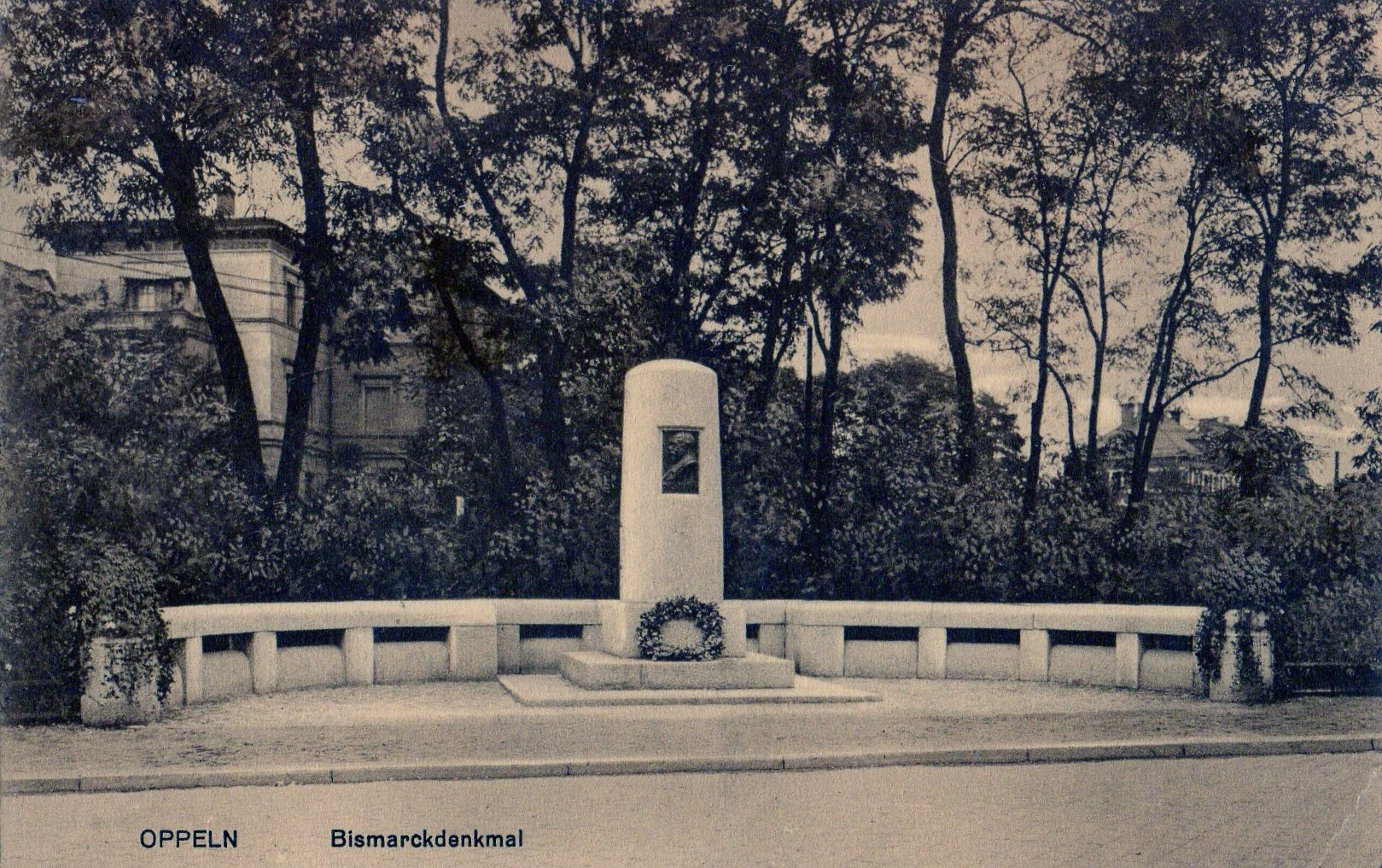 Das ehemalige Bismarckdenkmal am Oppelner Bahnhof, 1912